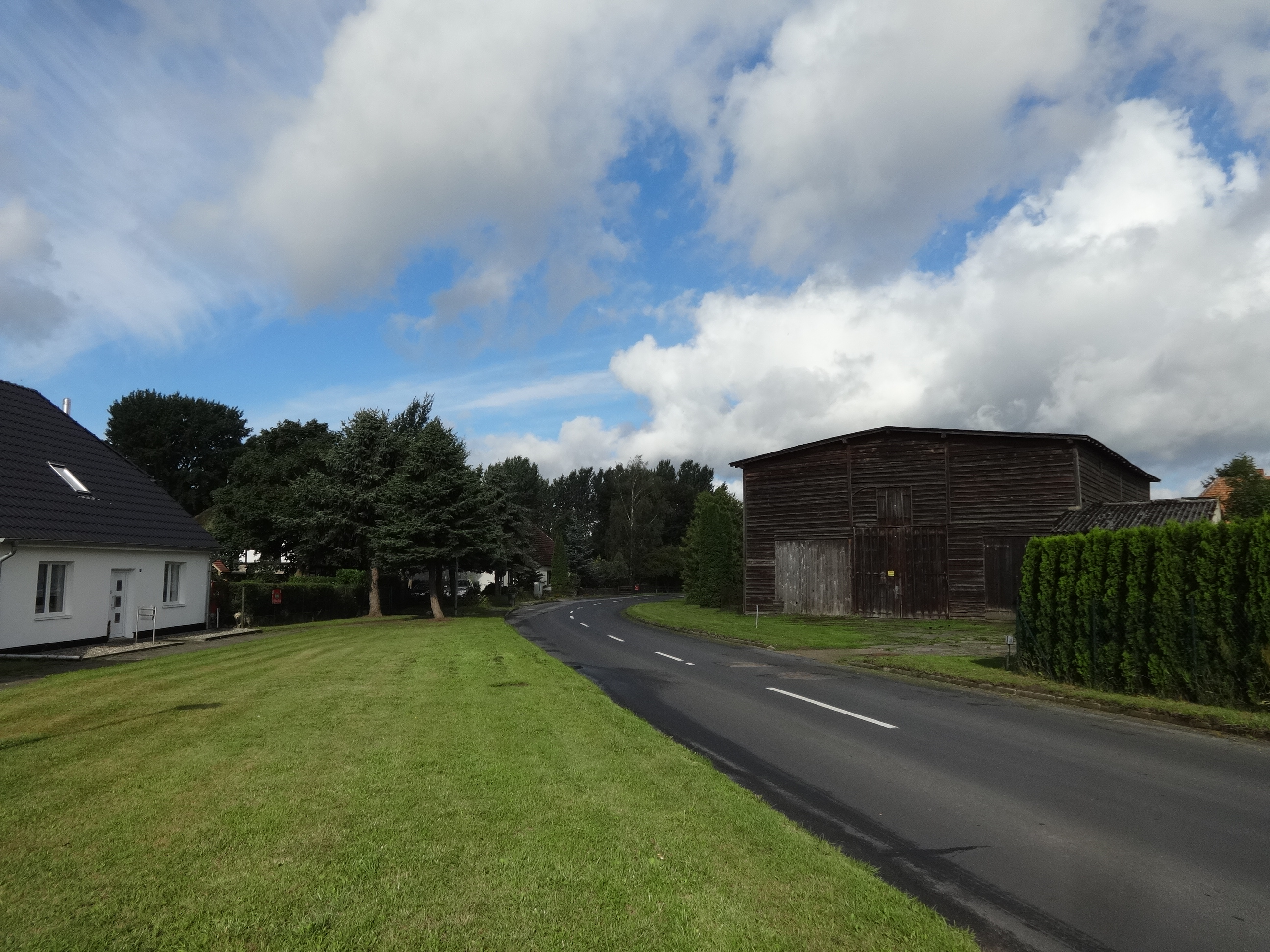 Rubenow, eine Gemeinde im Landkreis Vorpommern-Greifswald in Mecklenburg-Vorpommern